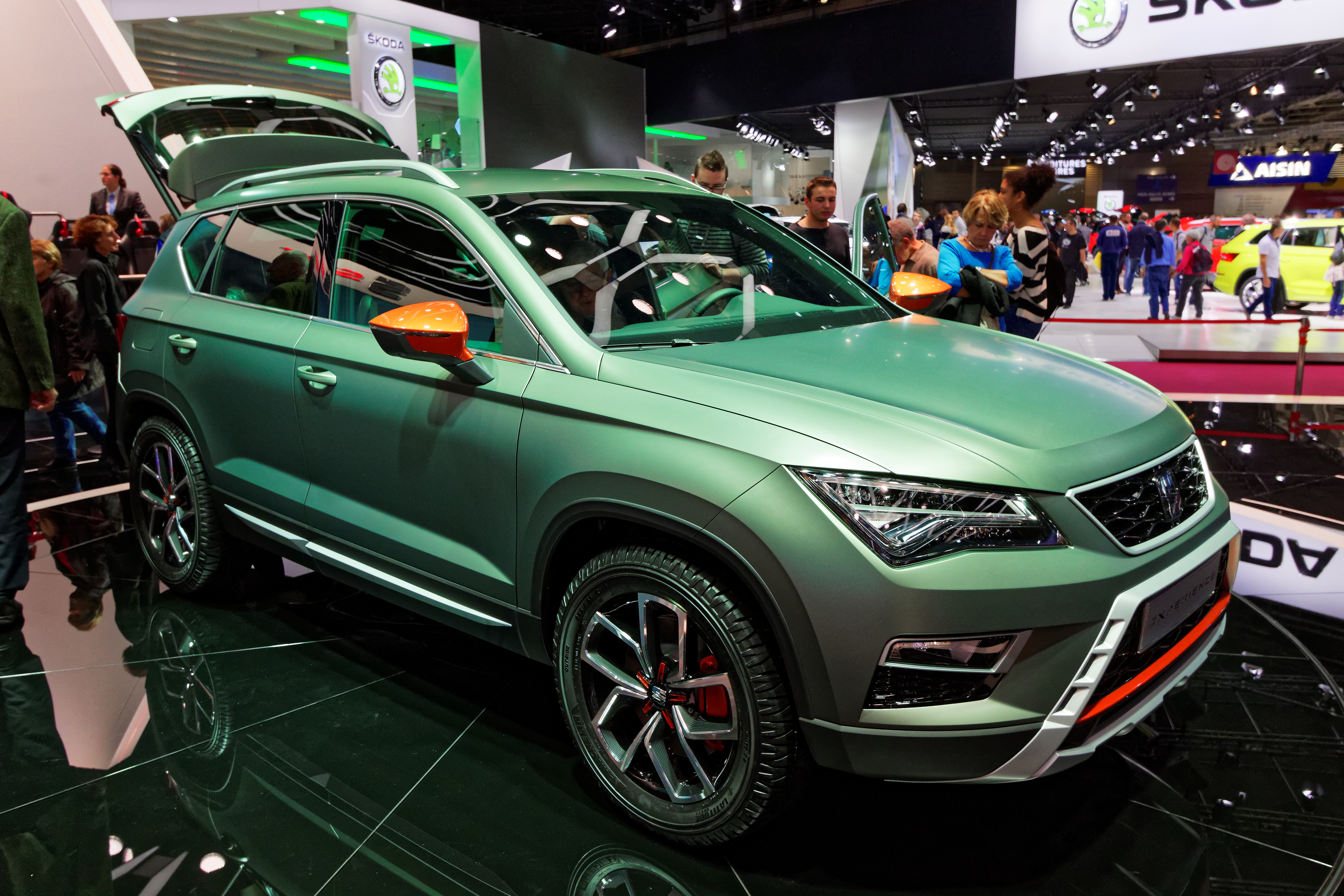 Une Seat Ateca X-Perience présentée lors du mondial de l'automobile de Paris 2016.